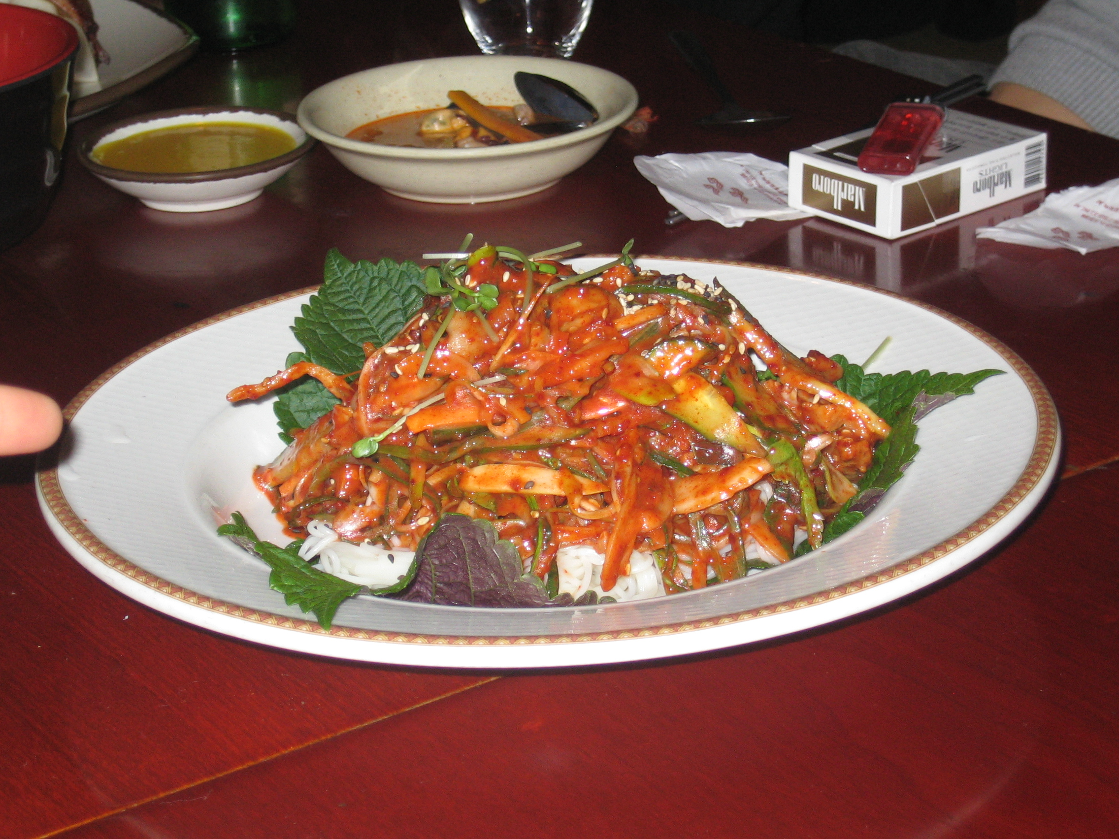 Korean cuisine-Anju-Golbaengi muchim